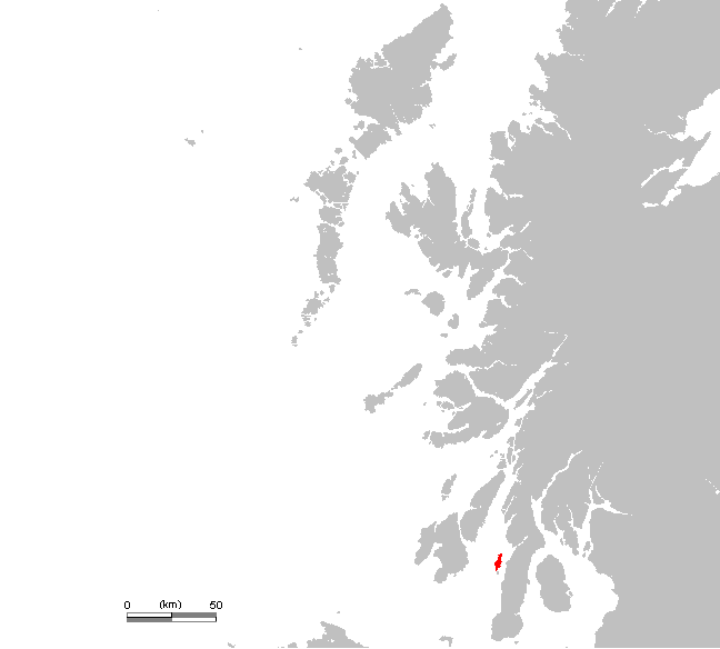 Description:Carte de l'île de Gigha en Ecosse, royaume-Uni *Auteur:Rémih